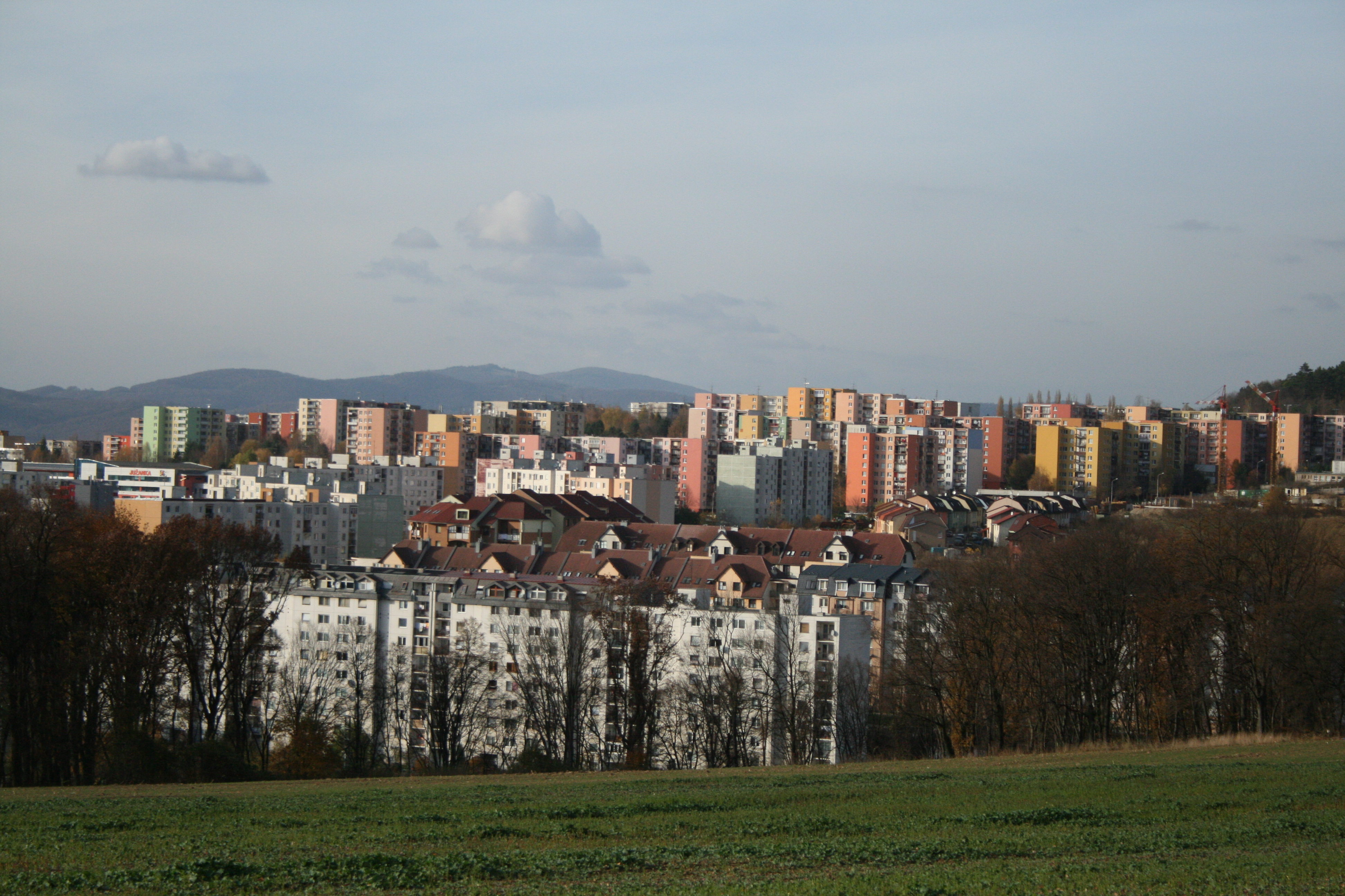 Trenčín, sídlisko Juh